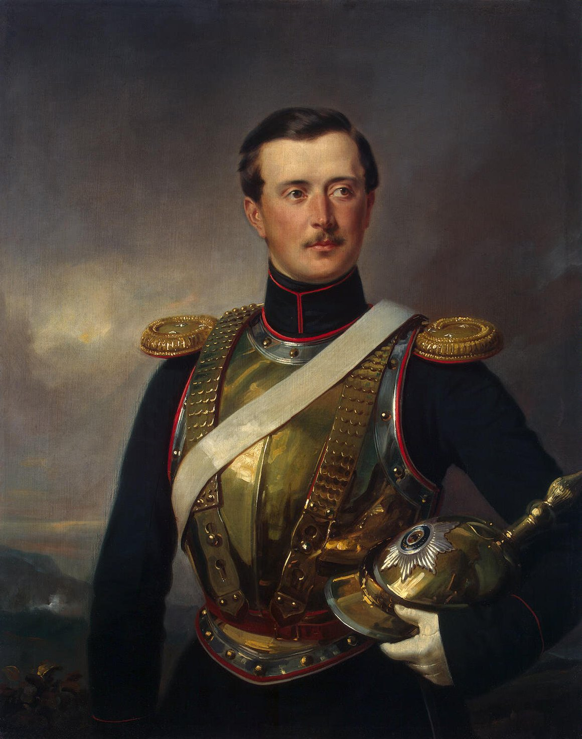 Портрет Петра Андреевича Шувалова (1827–1889). Холст, масло. 97x77 см. ГЭ. Источник поступления в музей: через Государственный музейный фонд из собрания Шуваловых в С.-Петербурге. 1923